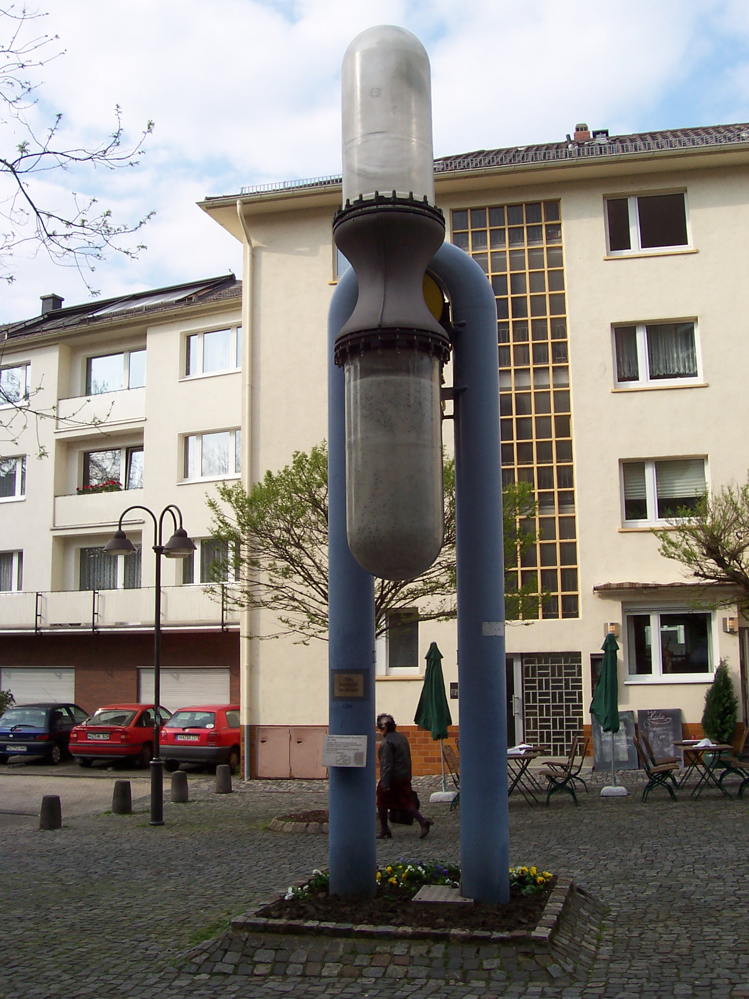 Größte und genaueste "Sanduhr" der Welt von Schott in Mainz (Stand: 1984).